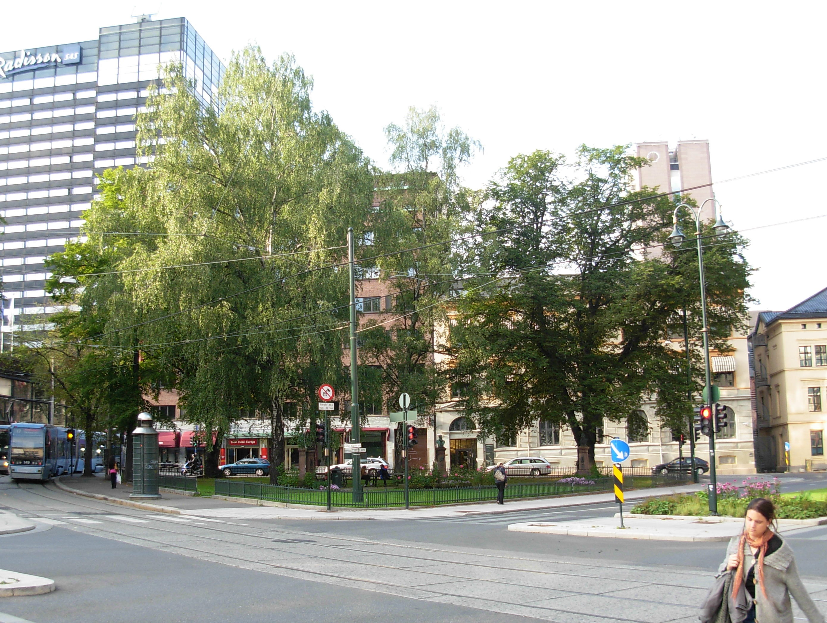 Halfdan Kjerulfs plass, Oslo